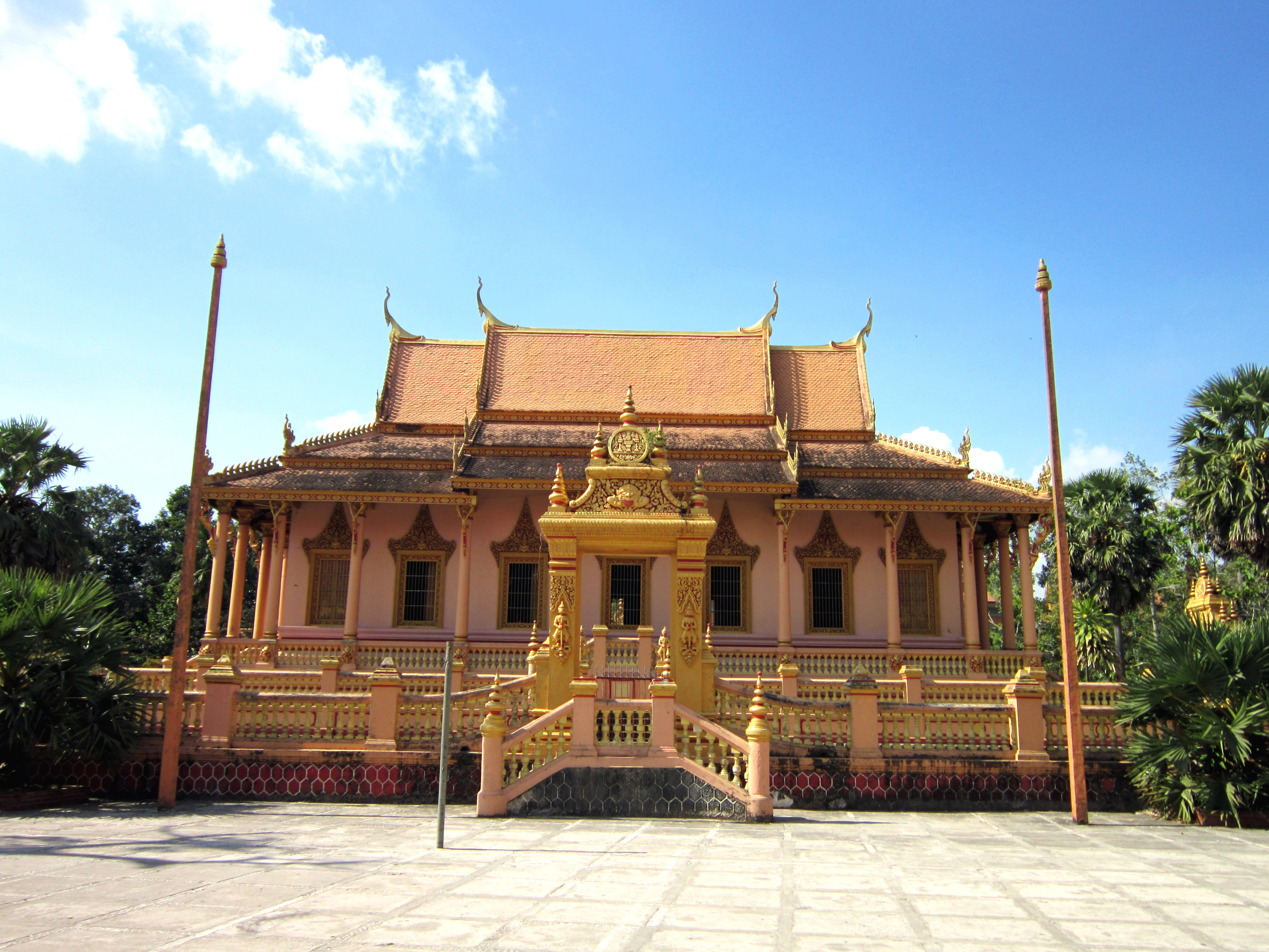 Chùa Khleang ở số 53 đường Tôn Đức Thắng, Tp Sóc Trăng (Sóc Trang, Việt Nam). Đây là một trong những ngôi chùa Khmer cổ nhất ở Sóc Trăng được xây dựng vào giữa thế kỷ 16, và đã được công nhận là Di tích lịch sử - văn hóa quốc gia.